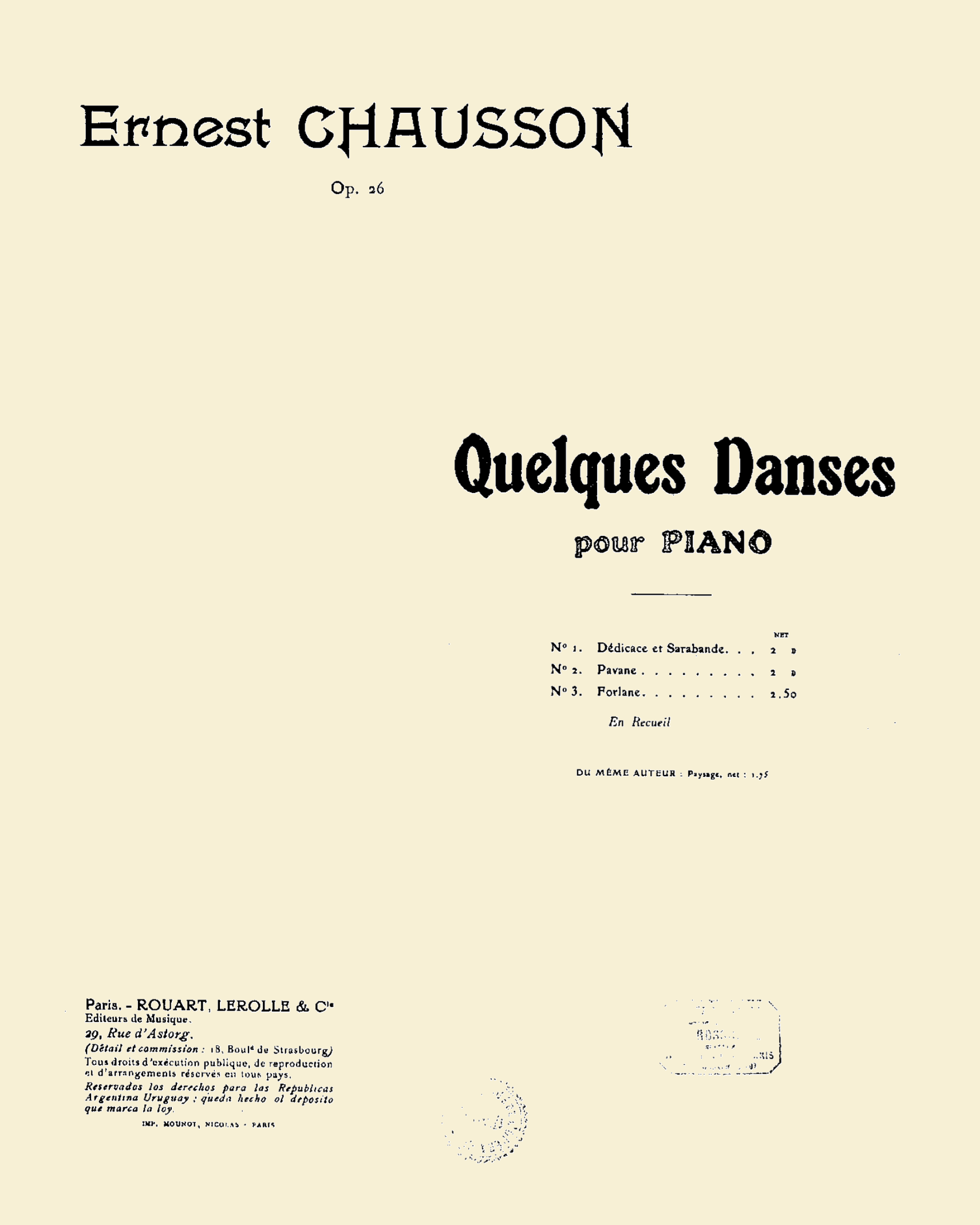 Ernest Chausson - Quelques Danses, op.26, page de titre de l'édition originale